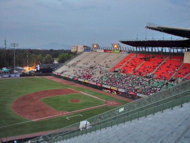 Estadio de beisbol